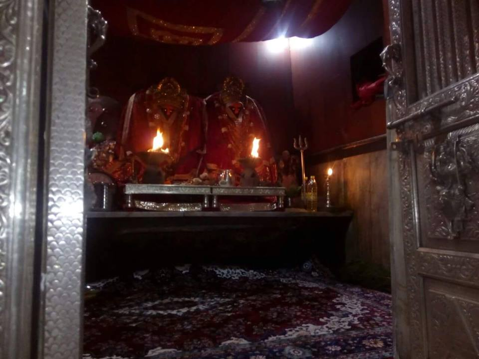 यह फोटो भंवाल शक्तिपीठ, नागौर जिला, राजस्थान की है.